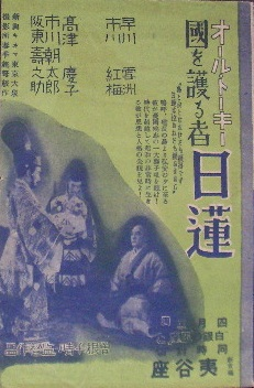 『国を護る者日蓮』、1935年公開時のフライヤー